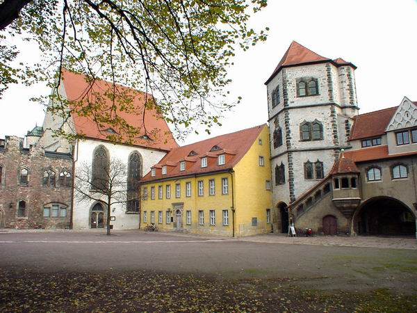 Halle Moritzburg, eigenes Foto von 2004, public domain Mewes, Schlosshof.